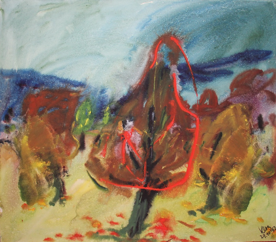 Aquarell 70 x 80 cm